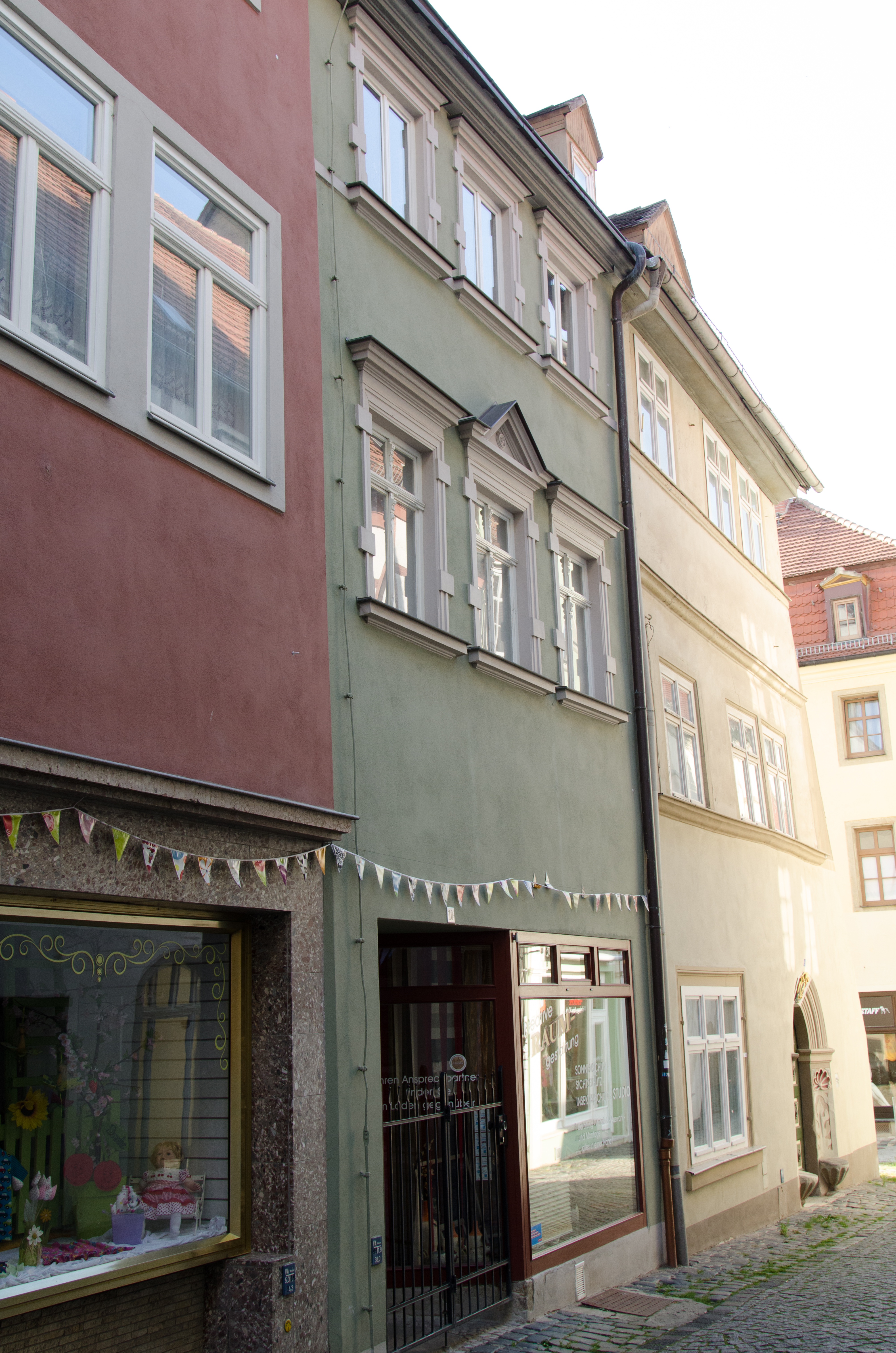 Naumburg, Engelgasse 10